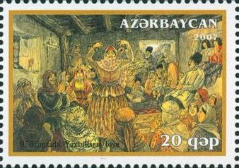 Rəssam Ə.Əzimzadənin əsəri